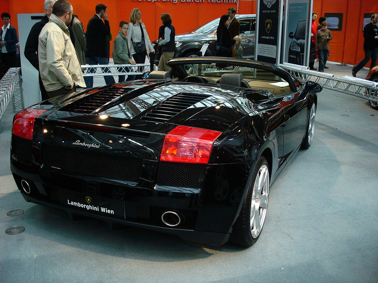 Heck eines schwarzen Lamborghini Gallardo Spyder